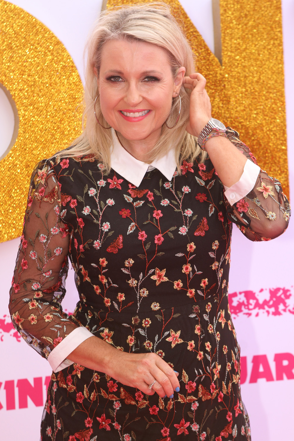 Angela Bishop